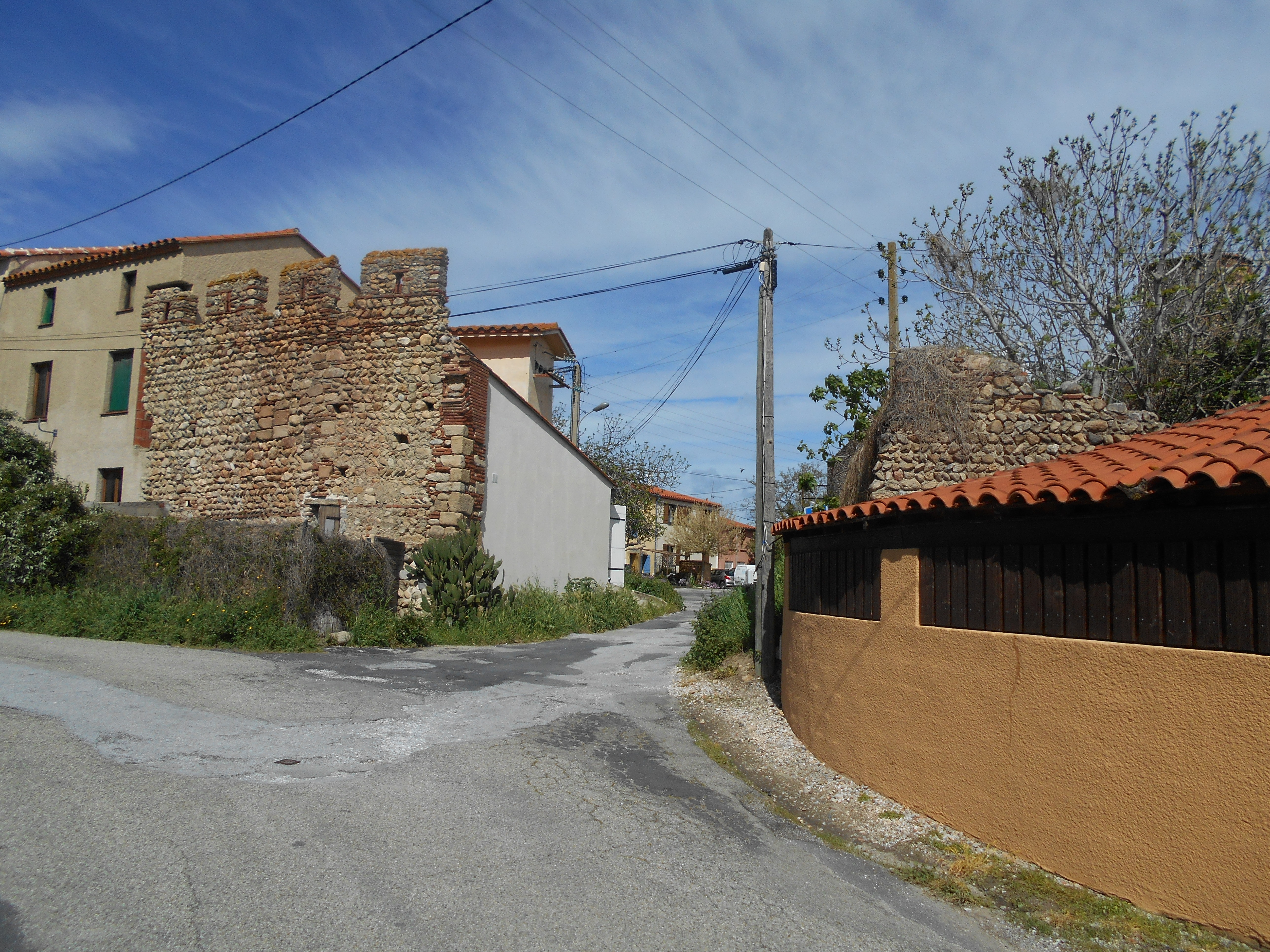 El poble murallat de Tatzó d'Avall, a Argelers de la Marenda